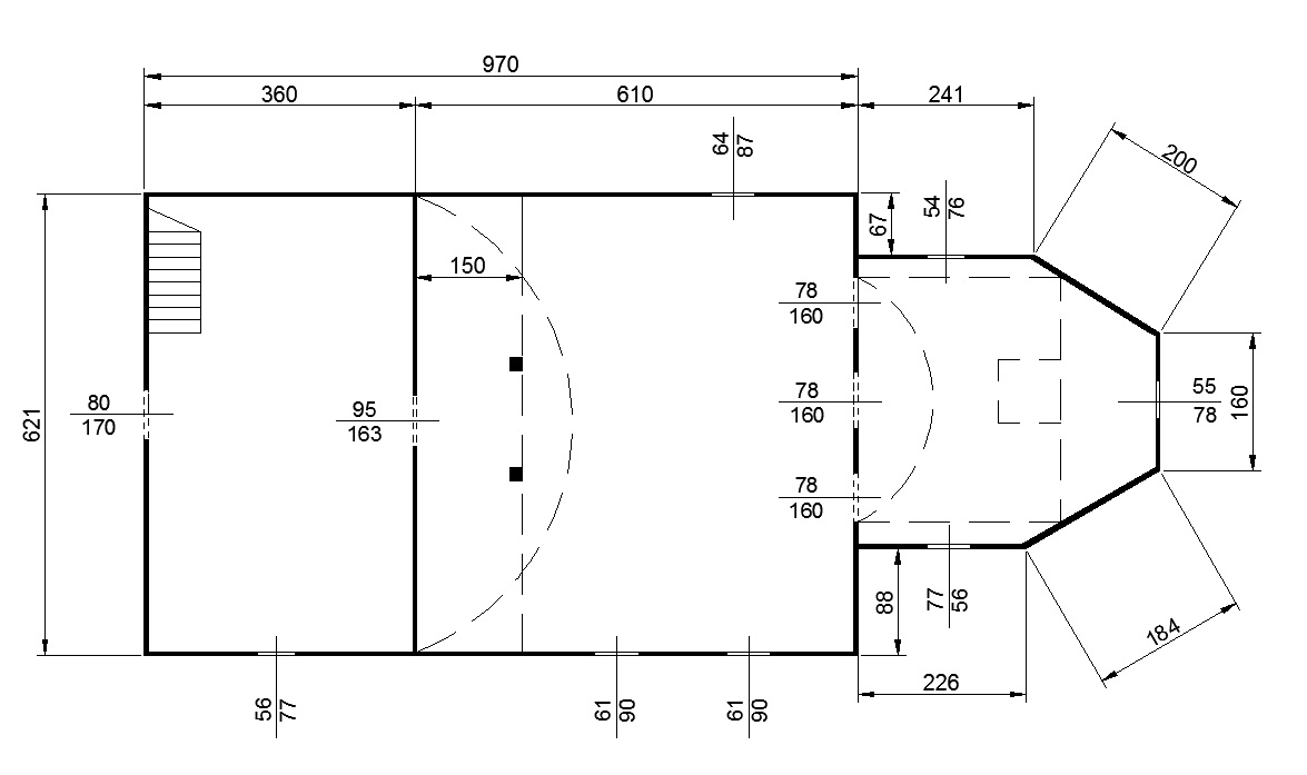 Planul bisericii de lemn din Bobota, județul Sălaj, mutată la Corni, județul Maramureș, demolată în anii '70. După Iurașciuc, I. și Șainelic, Ș. (1975). "Monumente de arhitectură populară: bisericile de lemn din Zona Codru". Satu Mare, Studii și Comunicări: 165-203, pl. XX.